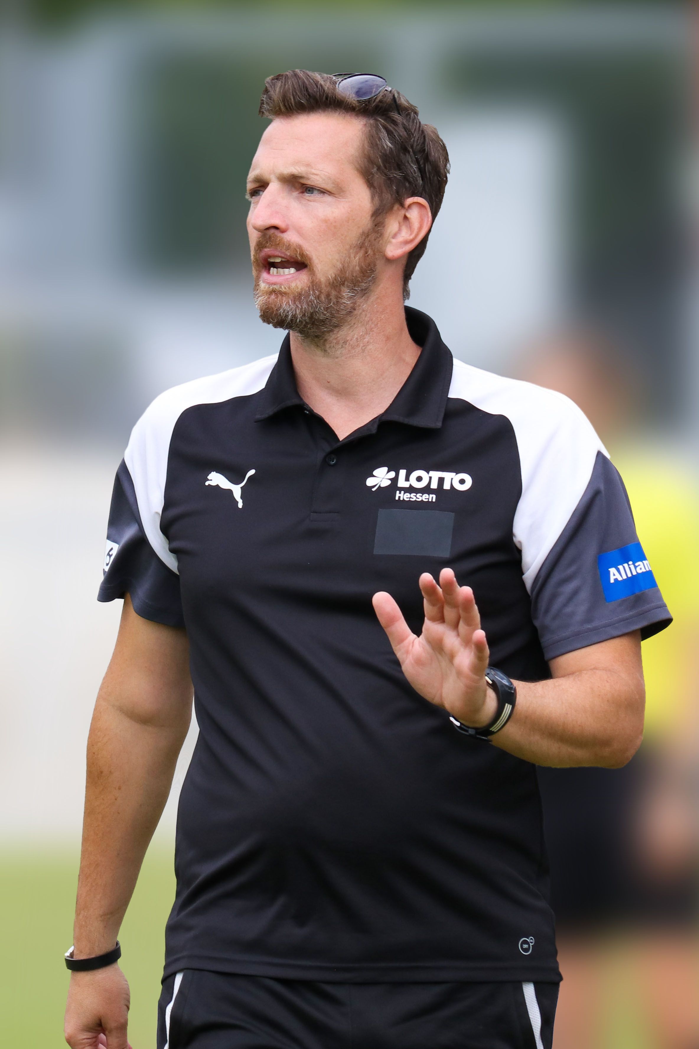 Portrait von Christopher Heck im Jahr 2018